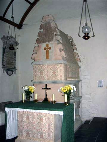 Cysegr Melangell, Pennant Melangell